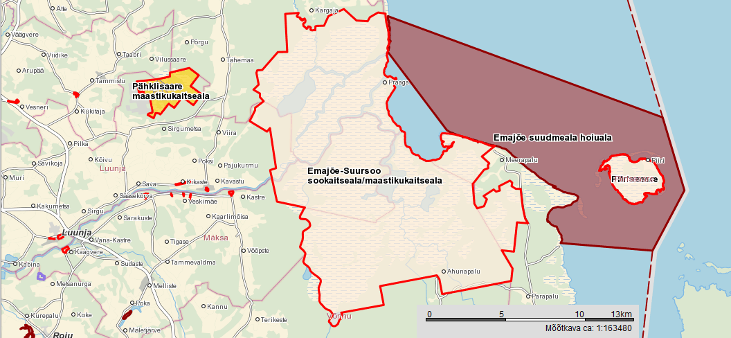 Emajõe suursoo MKA ja Pähklisaare MKA paiknemine kaardil. Põhineb Maa-ameti kaardil.